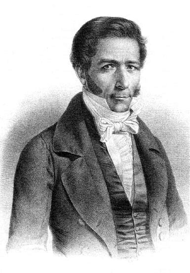 José Gaspar Marín (1772-1839) fue un político chileno. Tuvo importante participación en la Primera Junta de Gobierno y en la naciente vida política del país.